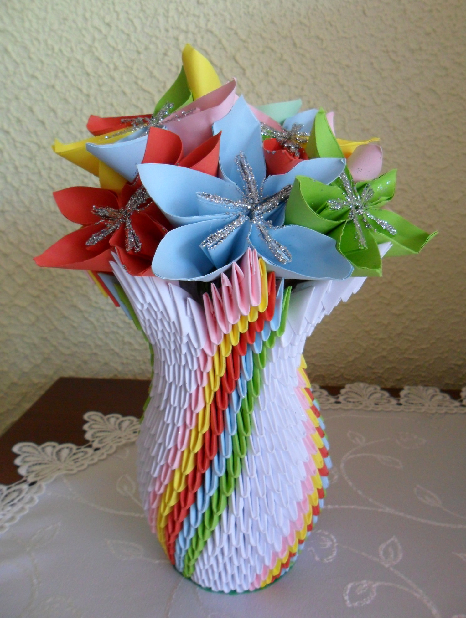 Kwiatki w wazonie